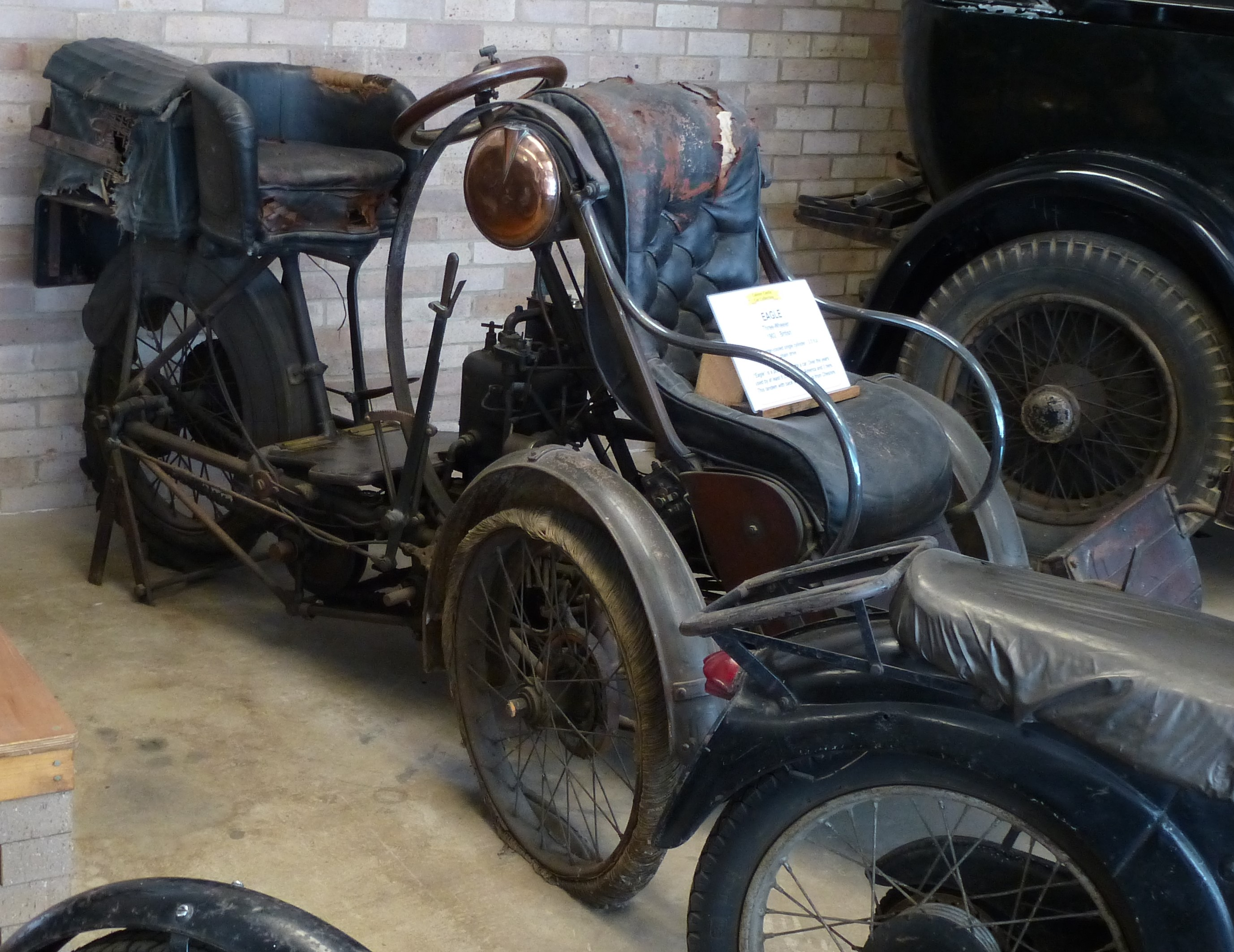 Eagle Tricar 1902